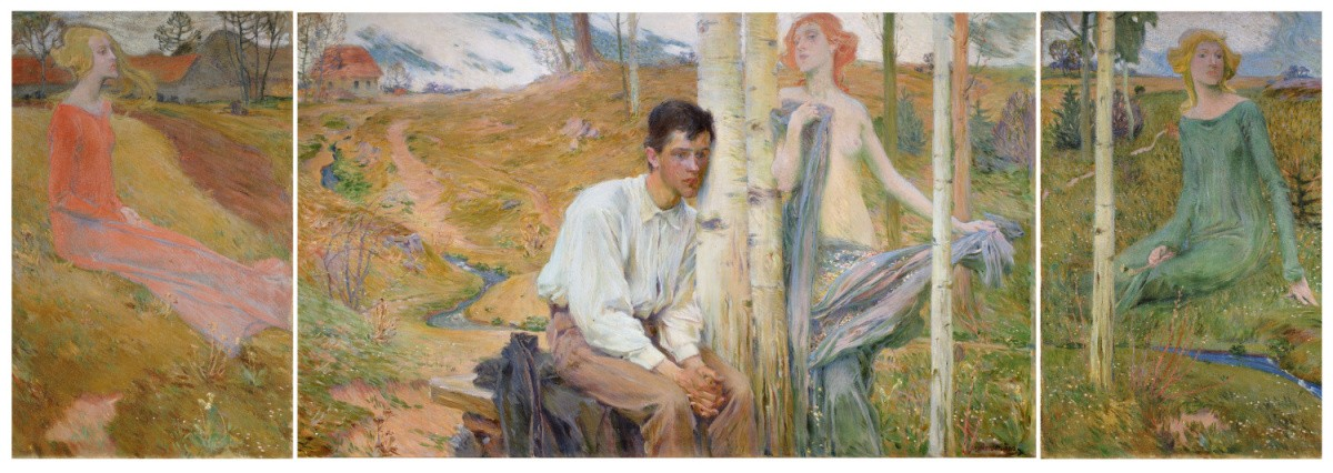 Jaro (triptych